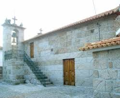 Amarante Carneiro Igreja Matriz